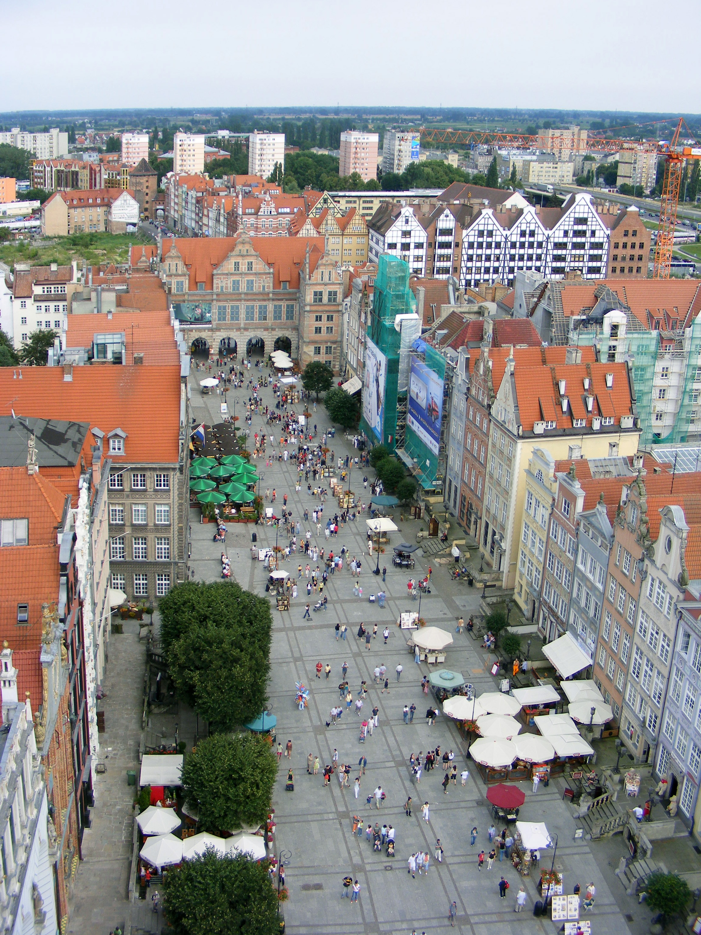 ulica Długi Targ w Gdańsku , widok z wieży Ratusza Głównego Miasta